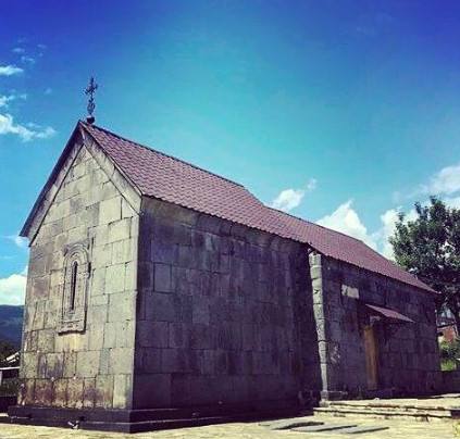 Աքորի